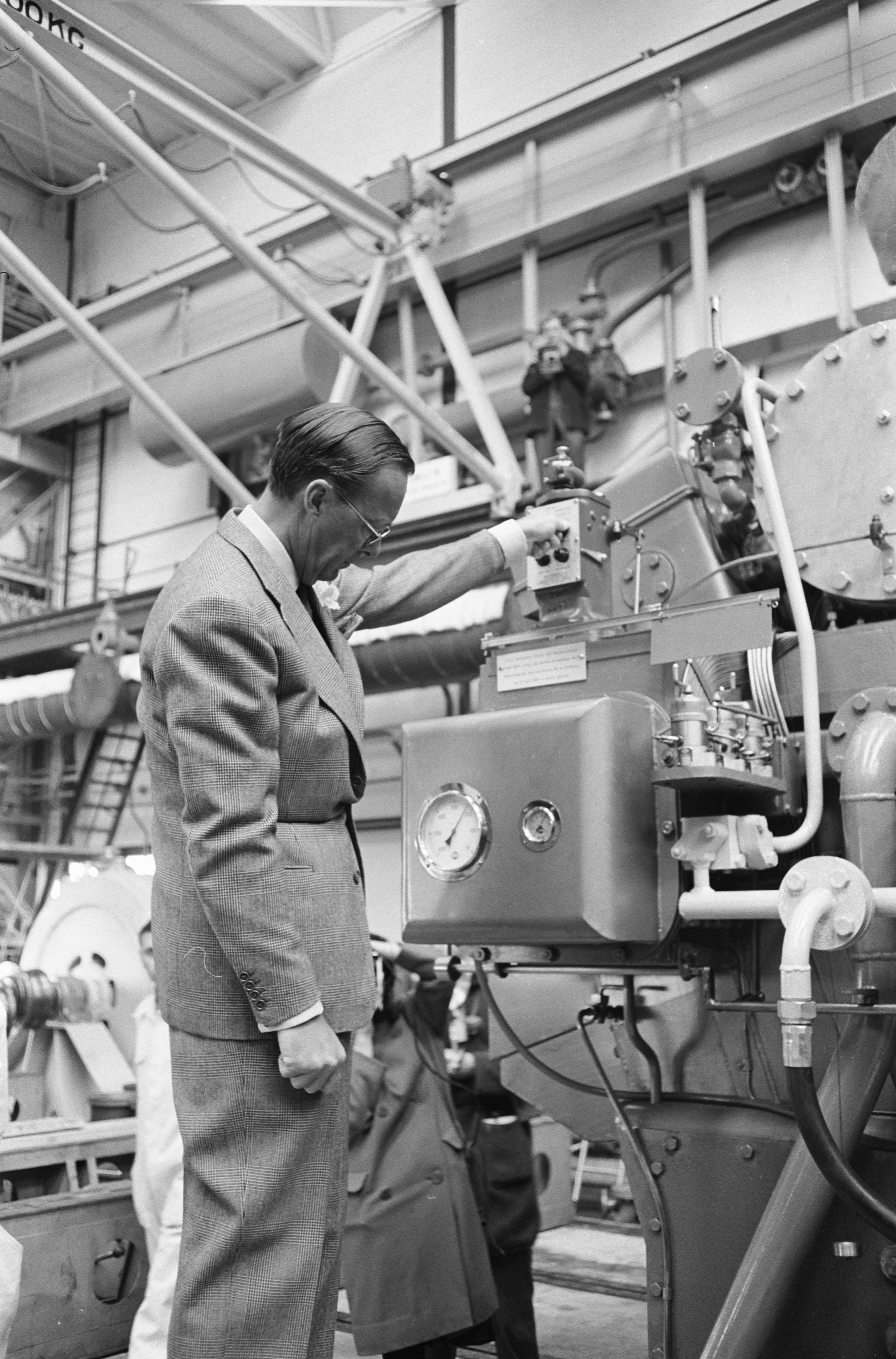 Collectie / Archief : Fotocollectie Anefo Reportage / Serie : [ onbekend ] Beschrijving : Bezoek Prins Bernhard aan Zeeland fabriek van Smit en Bolnes te Zierikzee Datum : 10 april 1962 Locatie : Zeeland, Zierikzee Trefwoorden : PRINSEN, bezoeken, fabrieken Persoonsnaam : Bernhard, prins, Smit Fotograaf : Pot, Harry / Anefo Auteursrechthebbende : Nationaal Archief Materiaalsoort : Negatief (zwart/wit) Nummer archiefinventaris : bekijk toegang 2.24.01.05 Bestanddeelnummer : 913-7505